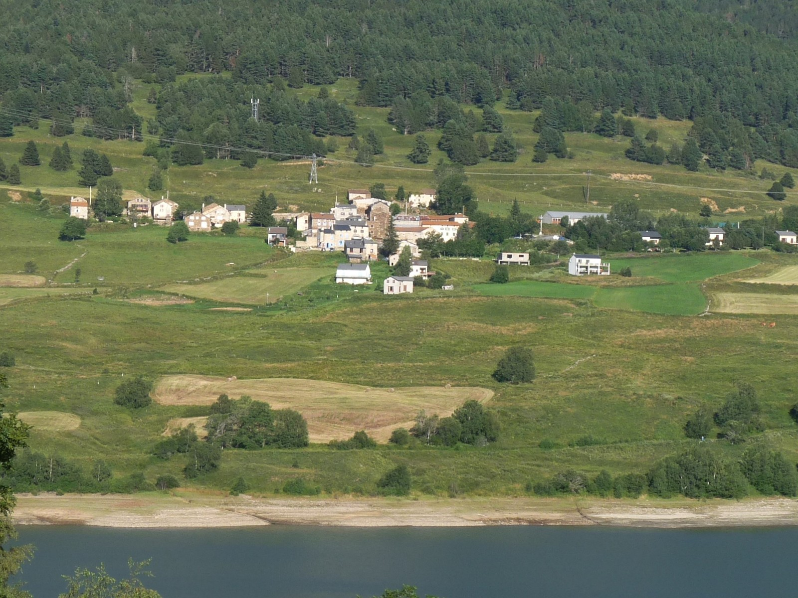 Odeillo (Réal) vu depuis Puyvalador, Pyrénées-Orientales, France